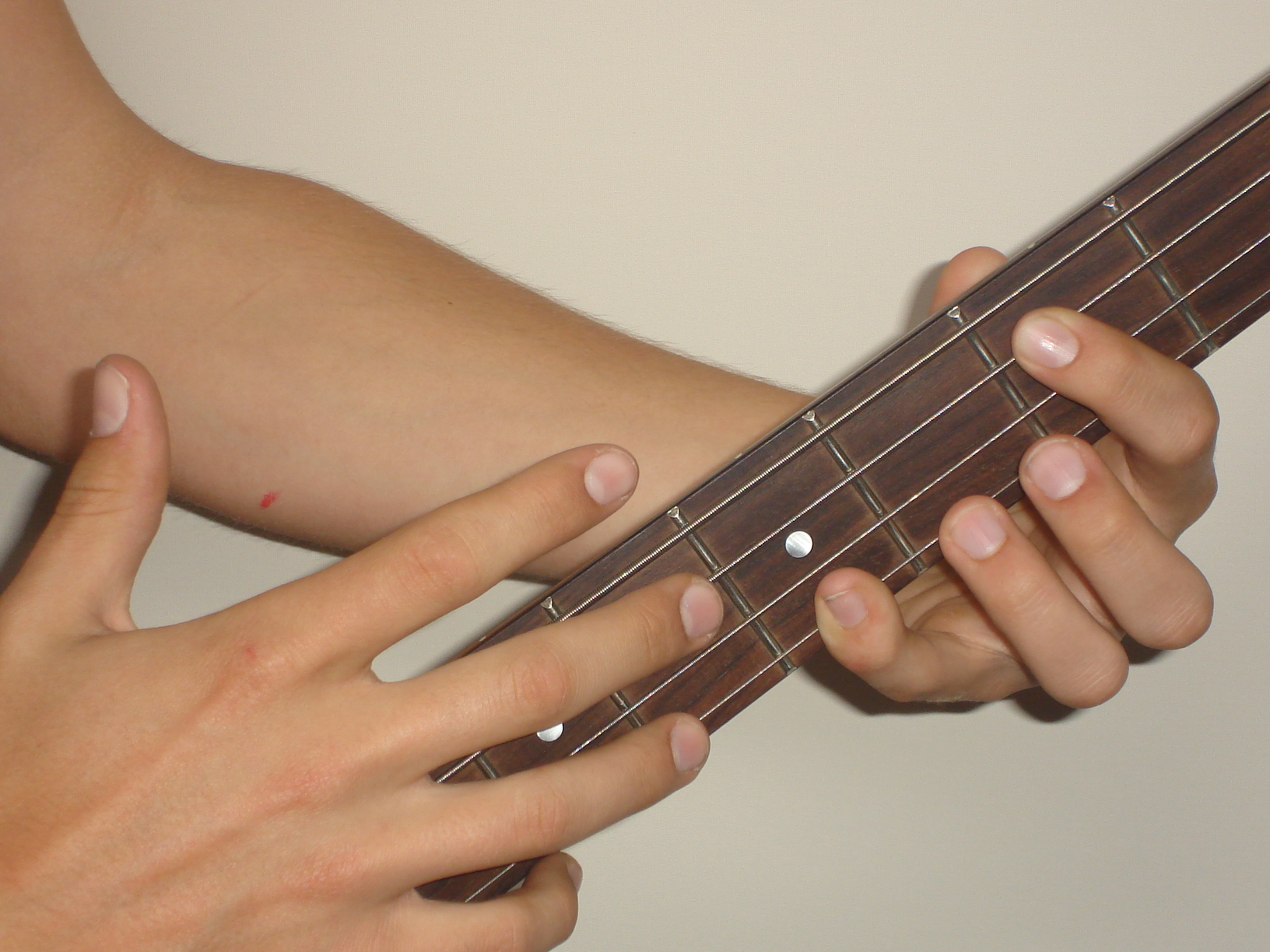 Tapping on a bass guitar